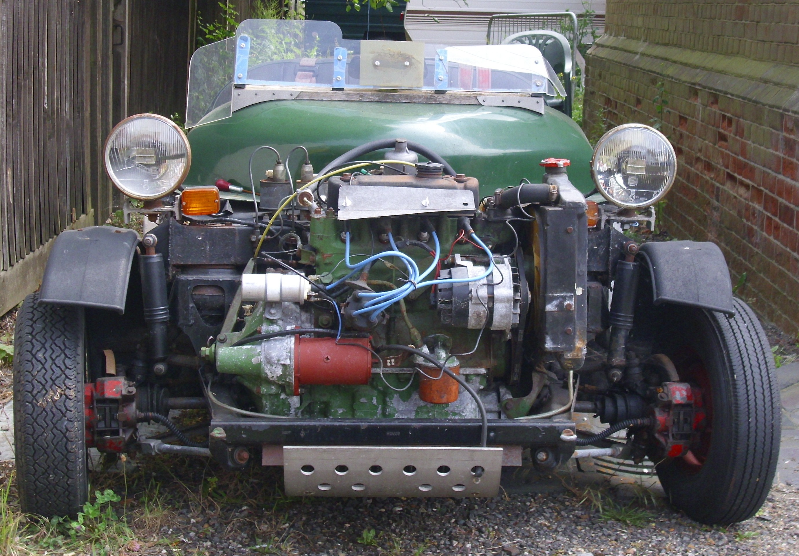 Skip